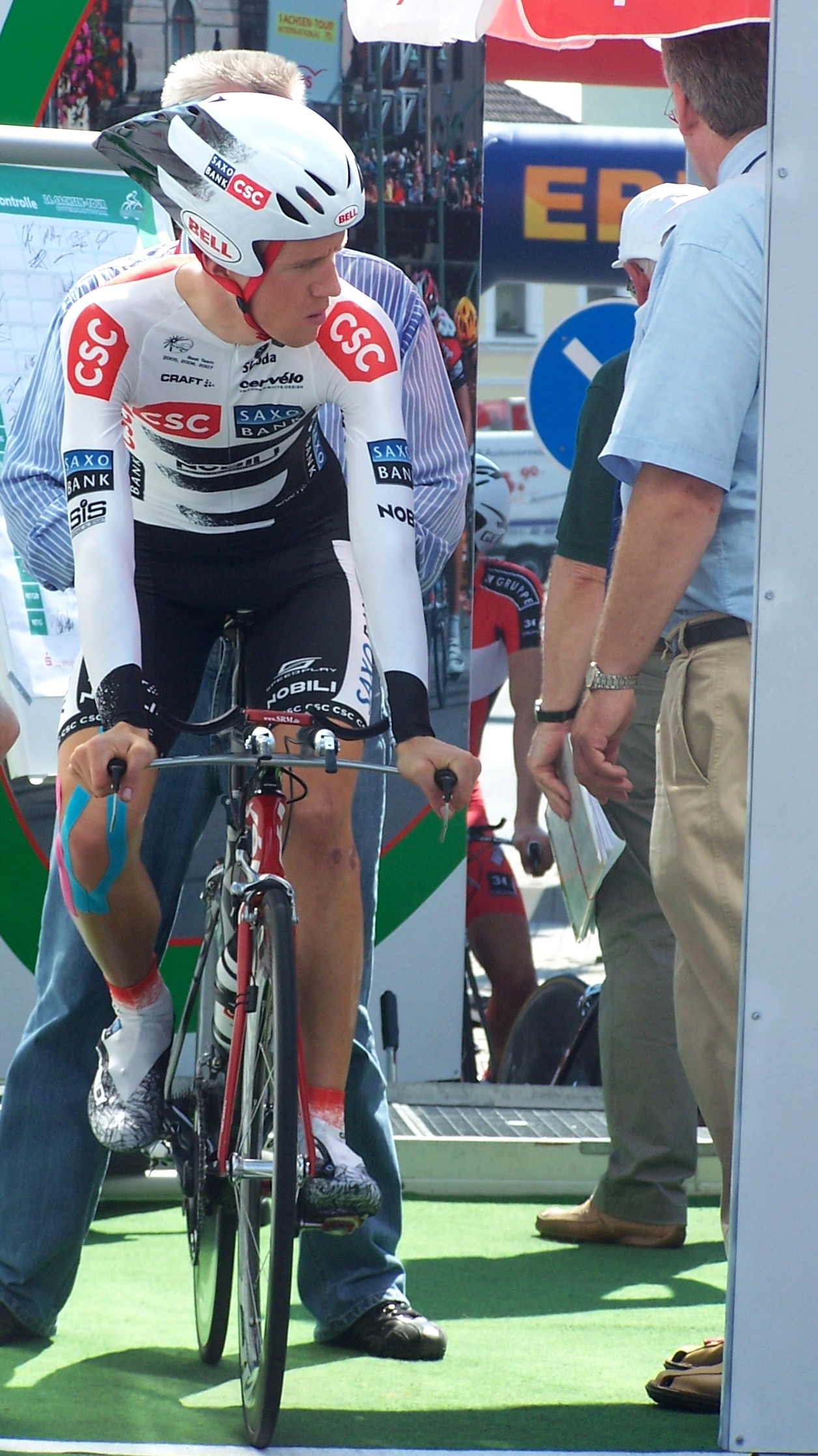 Die Aufnahme entstand beim Einzelzeitfahren der Sachsen-Tour 2008 in Großenhain